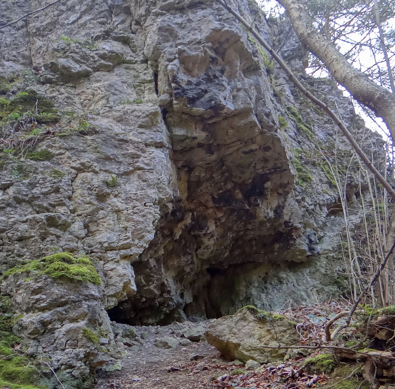 Okap w Środku Doliny (w Kruchej Turni)